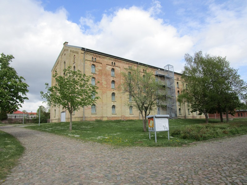 Magasinbygningen på Hestebjerget i Slesvig by